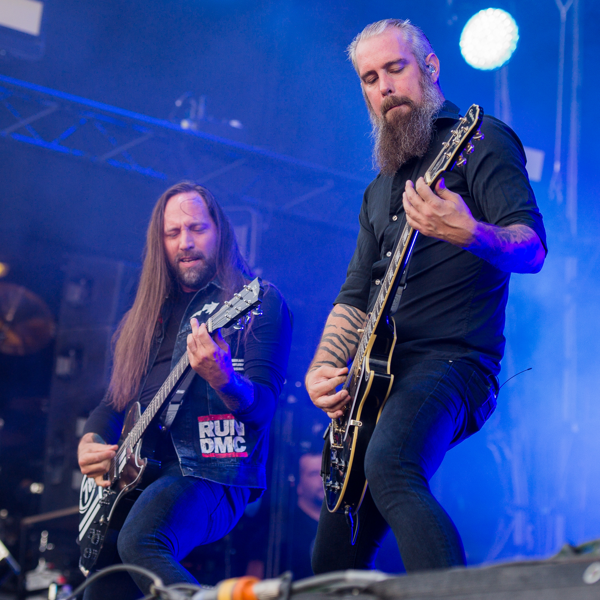 ARGO-Konzerte,Beck's Park Stage,Björn Gelotte,Festival,In Flames,Konzert,Livekonzert,Livemusik,Musik,Niclas Engelin,RiP,Rock im Park 2015